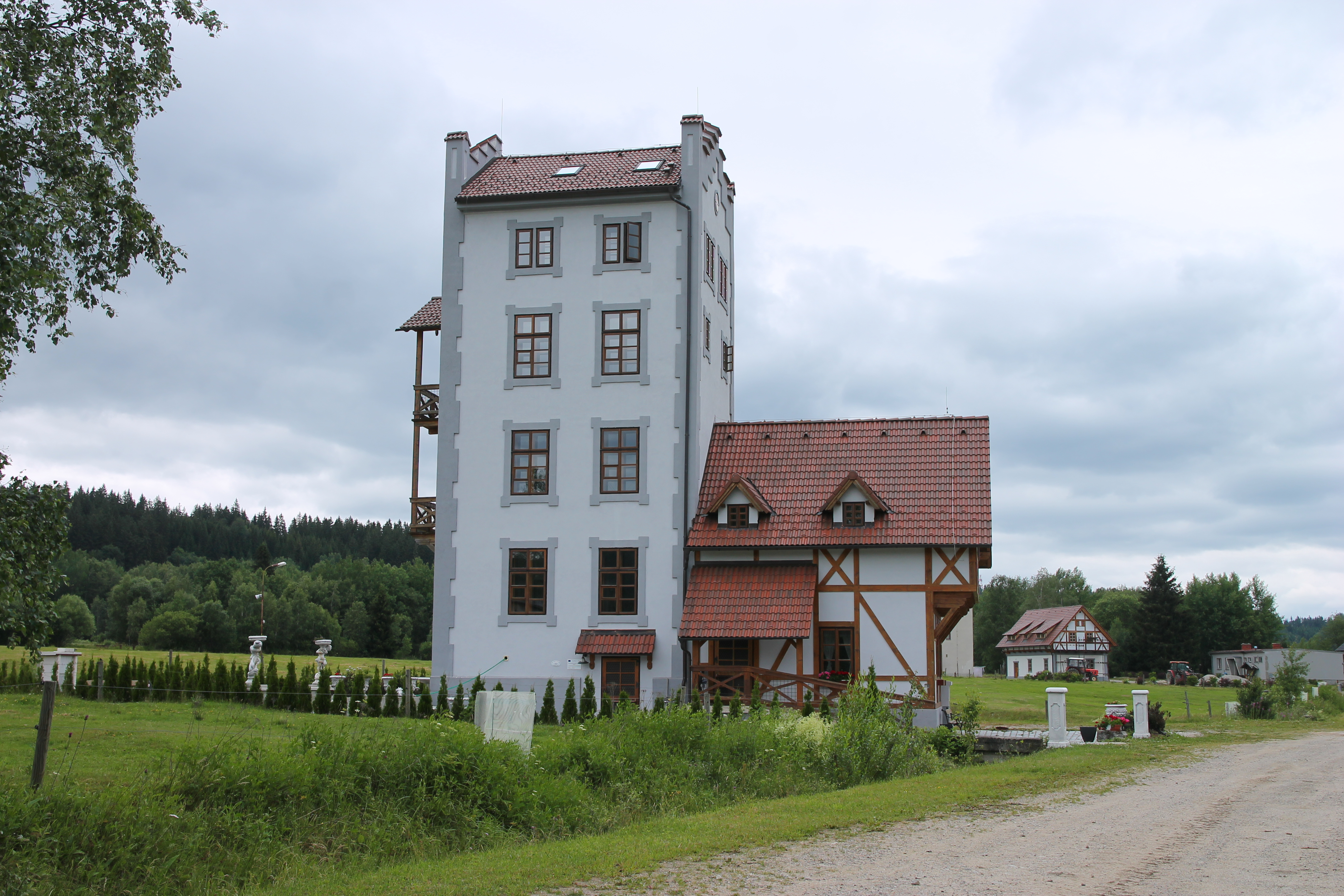 Obnovený lovecký zámeček v Klášterci u Vimperka